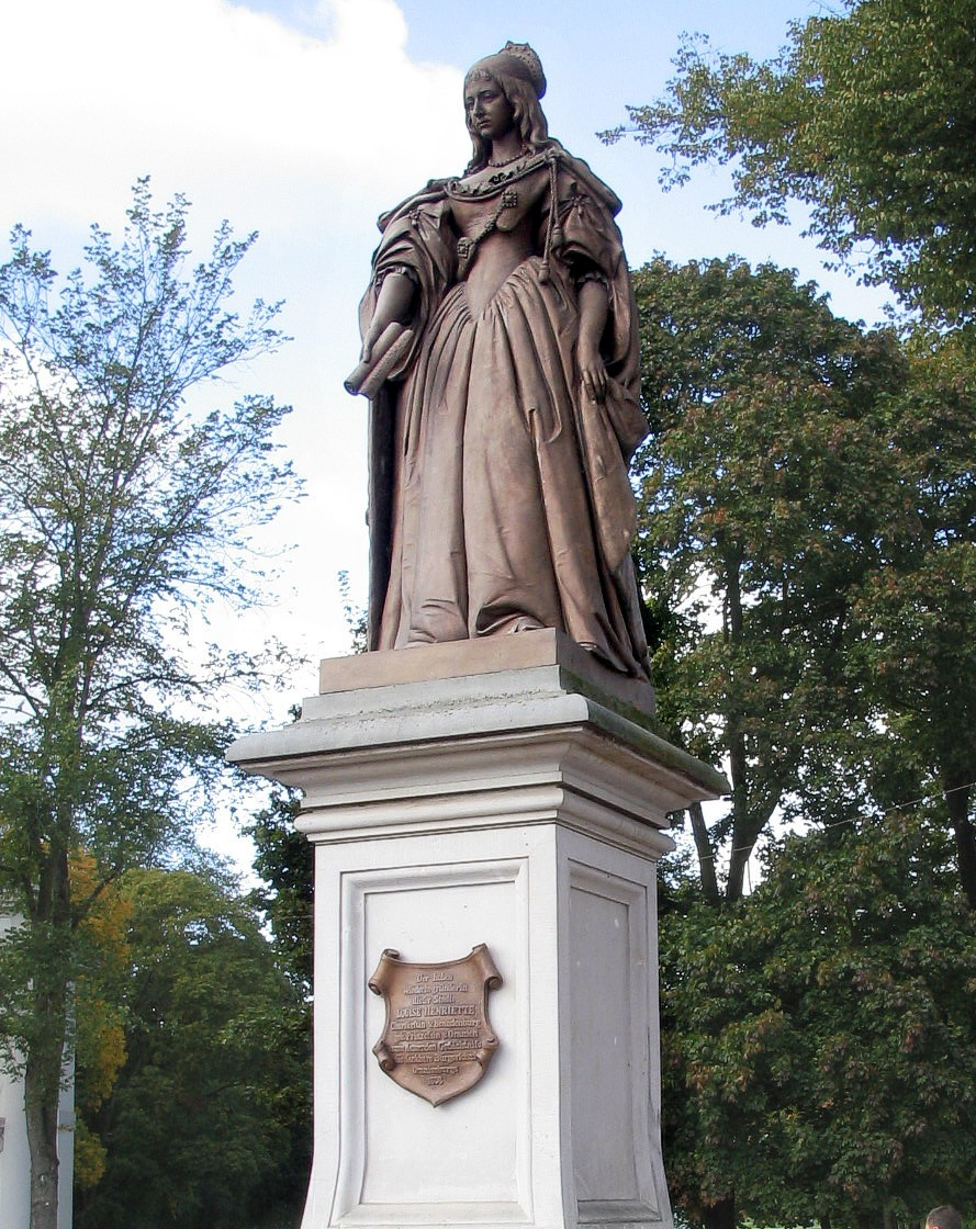 Denkmal für die Kurfürstin Luise Henriette von Oranien (1627-1667) auf dem Schlossplatz Oranienburg. Das Denkmal wurde 1858 eingeweiht, Bildhauer war Wilhelm Wolff.